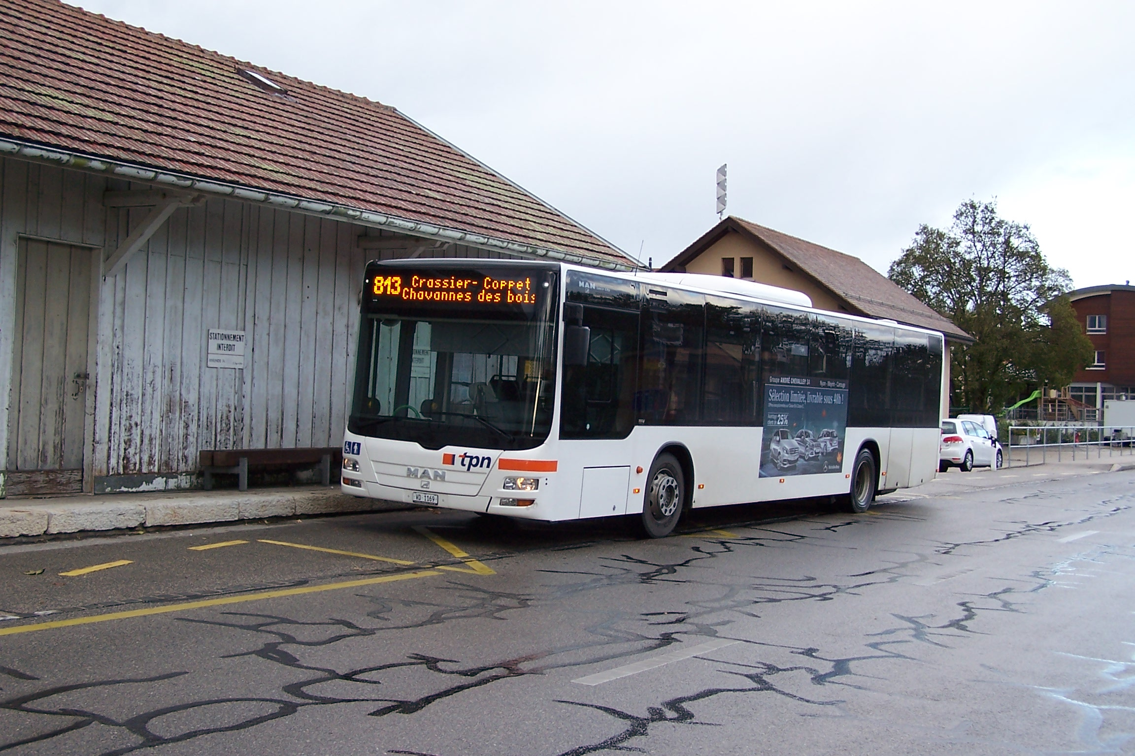 Ein MAN Lion's City Bus der TPN (Transports publics de la région nyonnaise) wartet auf die Abfahrt am ehemaligen Bahnhof Crassier.